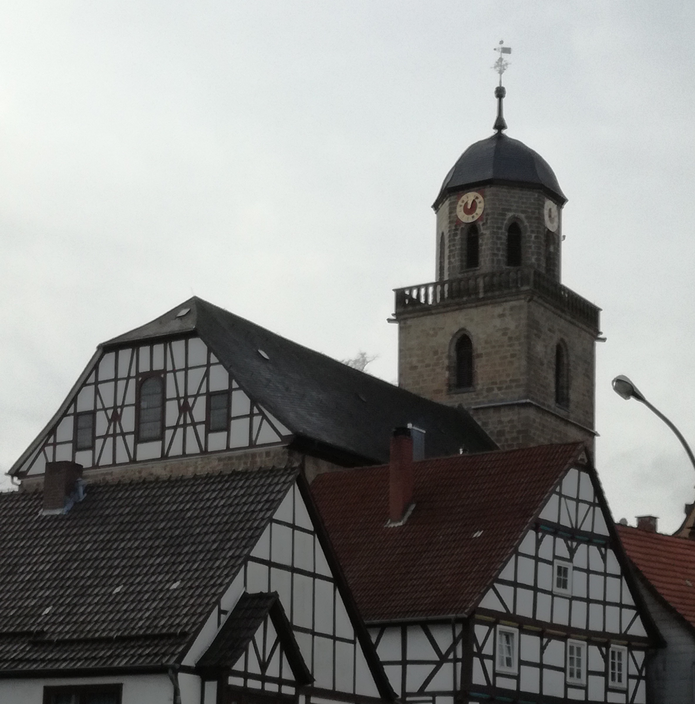 Ansicht von der Landstraße